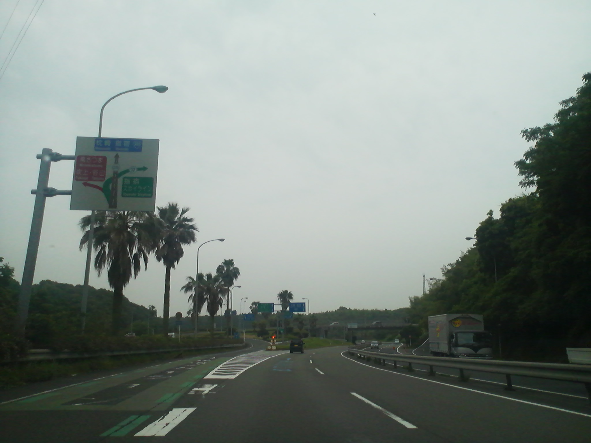 指宿スカイラインja:谷山インターチェンジの鹿児島方面から谷山出口を望む。